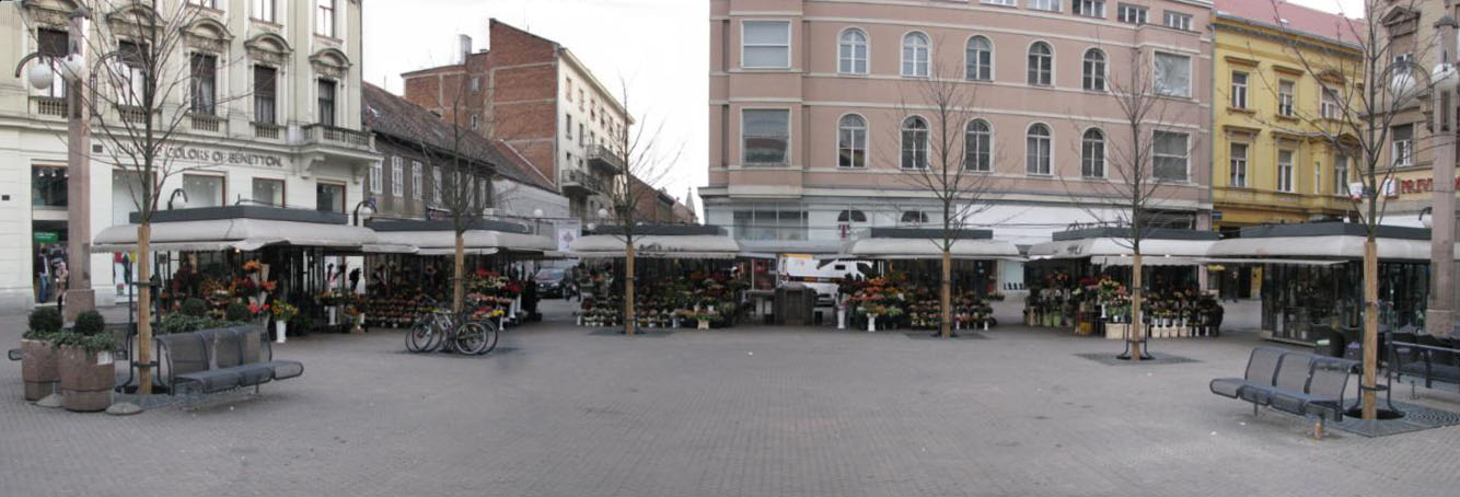 Cvjetni trg (Trg P. Preradovića), Zagreb, cvjećarnice